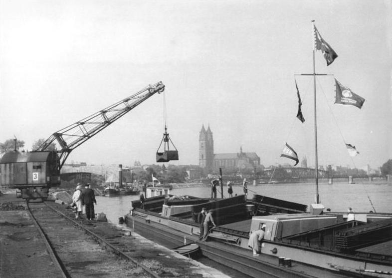 Magdeburg, Lastkahn, Verladekran Zentralbild Biscan 23.4.1957 Binnenschiffahrt auf der Elbe und Einführung der 49 Stunden Woche Im Zusammenhang mit der Einführung der 49 Stunden Woche in der Binnenschiffahrt legten die Kollegen der Deutschen Binnenschiffahrt den fahrplanmäßigen Schleppverkehr fest. Dadurch werden jetzt nicht nur Überstunden vermieden, sondern auch Zeiteinsparungen im Transportablauf erzielt. Die Schlepper verkehren nach einem festgelegten Fahrplan. Die Dampfer fahren täglich um 6.10 Uhr und 14.00 Uhr ab Magdeburg-Buckau flußaufwärts und zu den selben Zeiten ab Magdeburg-Elbreede flußabwärts. UBz: Hier wird Kohle und Kies gelöscht. Die Kähne kommen mit dem fahrplanmässigen Schleppzügen an.